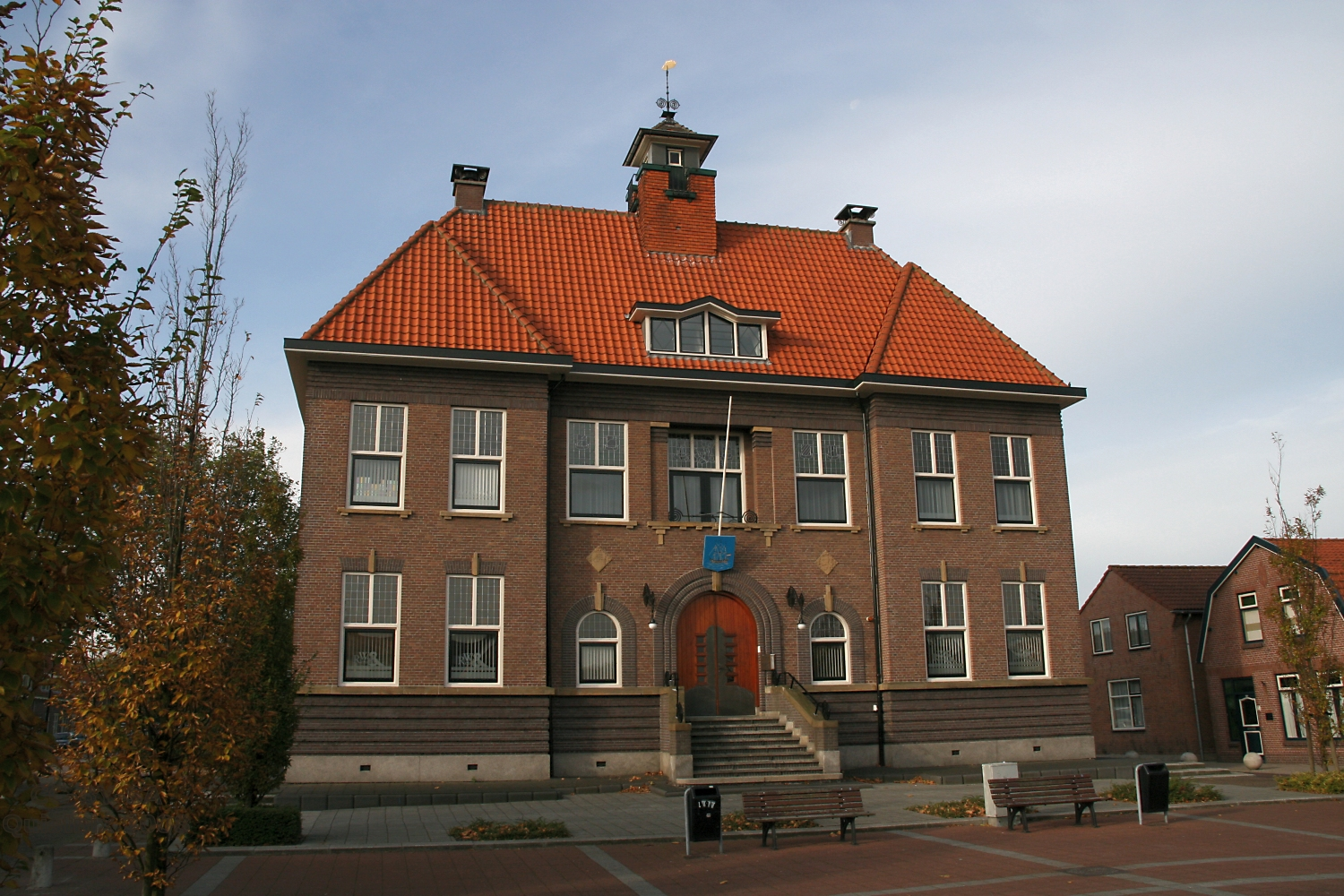 Schipluiden: Gemeentehuis